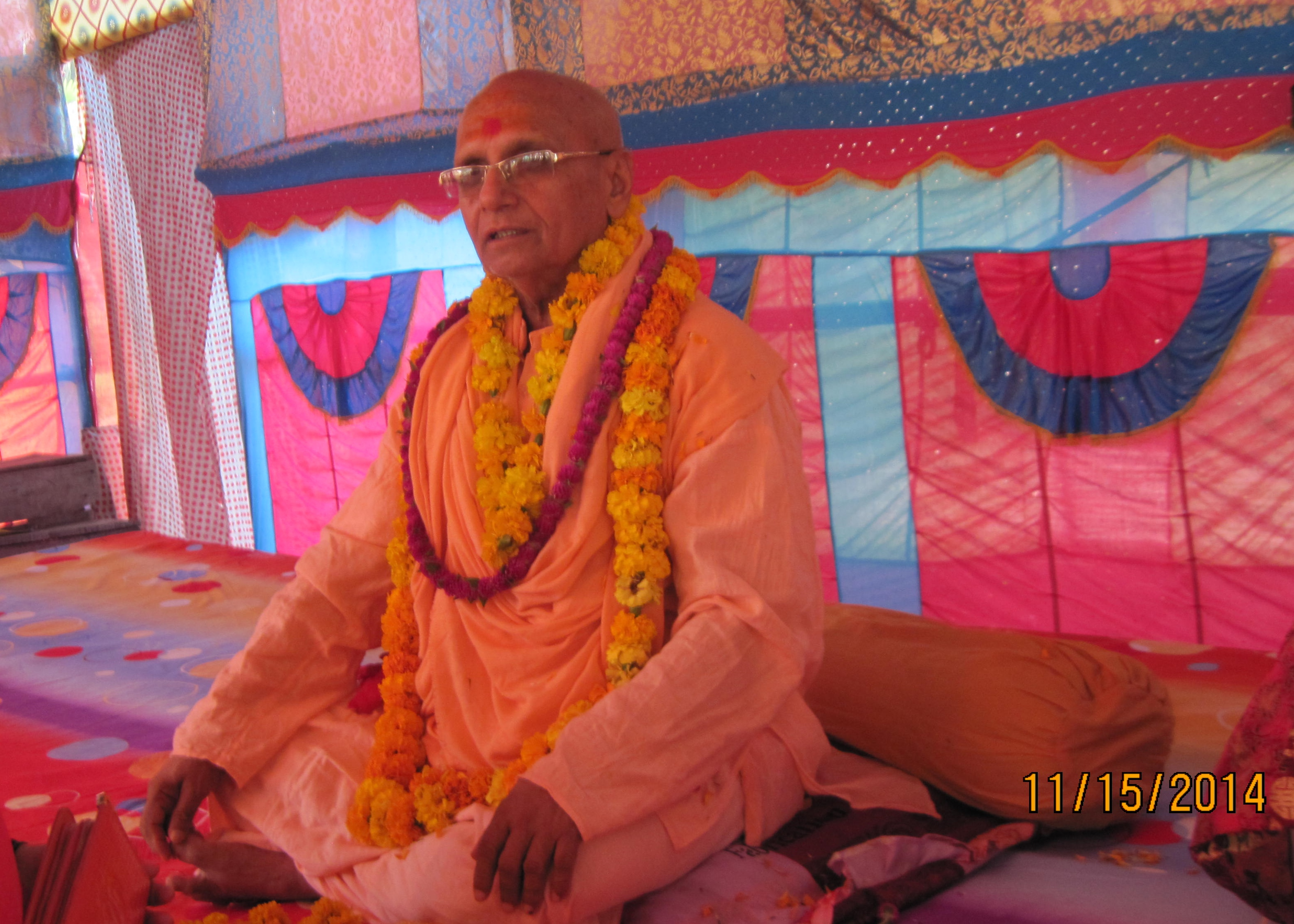 नेपाली: १००८ स्वामी कैलाशानन्द सरस्वती याेगीका रूपमा मात्र हाेइन एक विशिष्ट विद्वान्का रूपमा प्रतिष्ठापित छन् । वर्तमान समयमा उनी चतरा धामका पीठाधीश हुन् ।